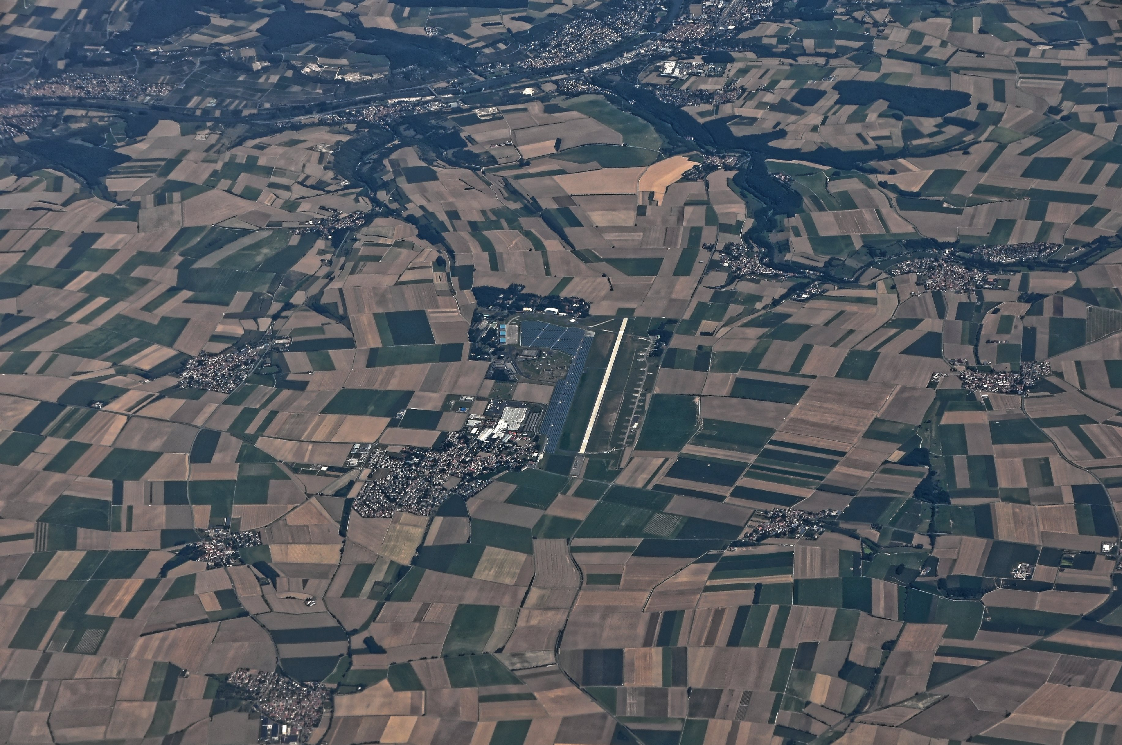 Bilder vom Flug -Rom-Düsseldorf-Hamburg 2013 Dieses Foto entstand in Zusammenarbeit mit Stadtbesichtigungen.de Die Seiten Stadtbesichtigungen.de, der dazugehörige Reise Blog sowie die Facebookseite: Stadtbesichtigungen Rom dürfen dieses Bild für Ihre Veröffentlichungen ohne den Hinweis auf Wikipedia, Commons bzw der Lizenz verwenden. Die Verantwortlichen habe von mir (Ra Boe) die Originaldaten zur freien Verfügung übermittelt bekommen.